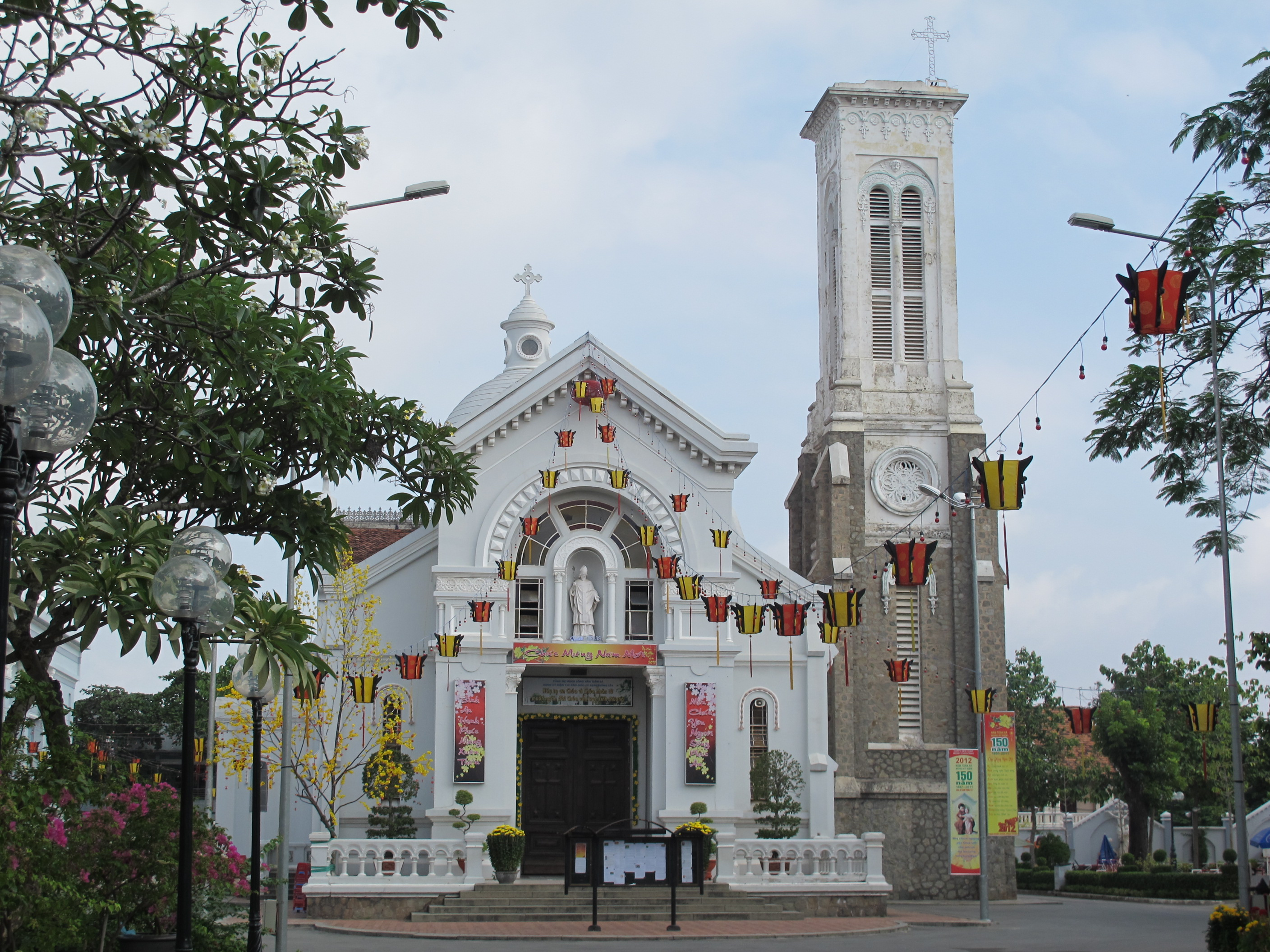 Nhà thờ hạnh thông tây, đường quang trung, Gò vấp tp Hcm vn